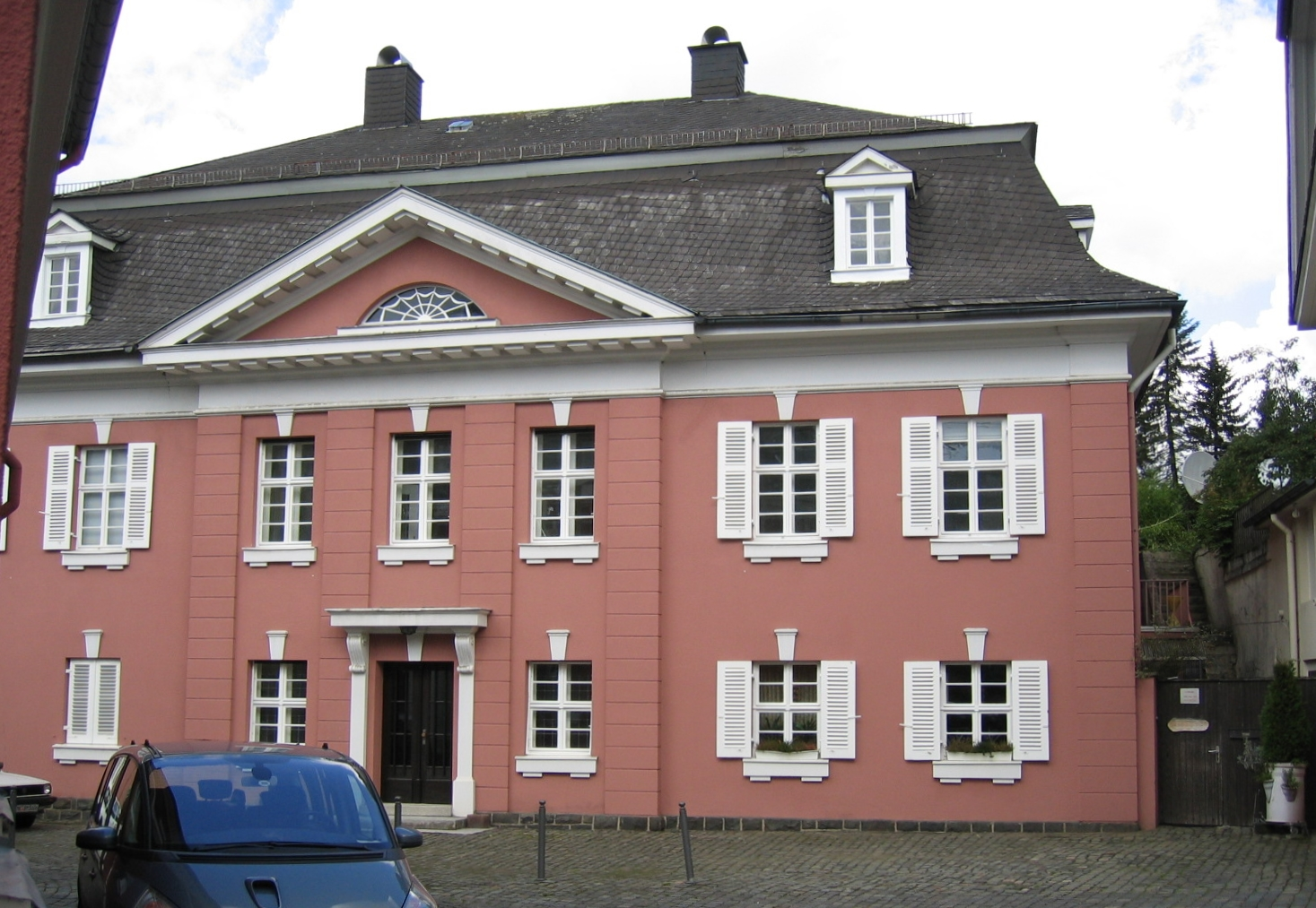 „Krugmann-Haus“ Krim 1 (Hauptgebäude) in Meinerzhagen. This image shows a heritage building in Germany, located in the North Rhine-Westphalian city Meinerzhagen (no. 22).